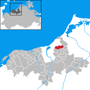 Rövershagen in Mecklenburg-Western Pomerania - District Bad Doberan